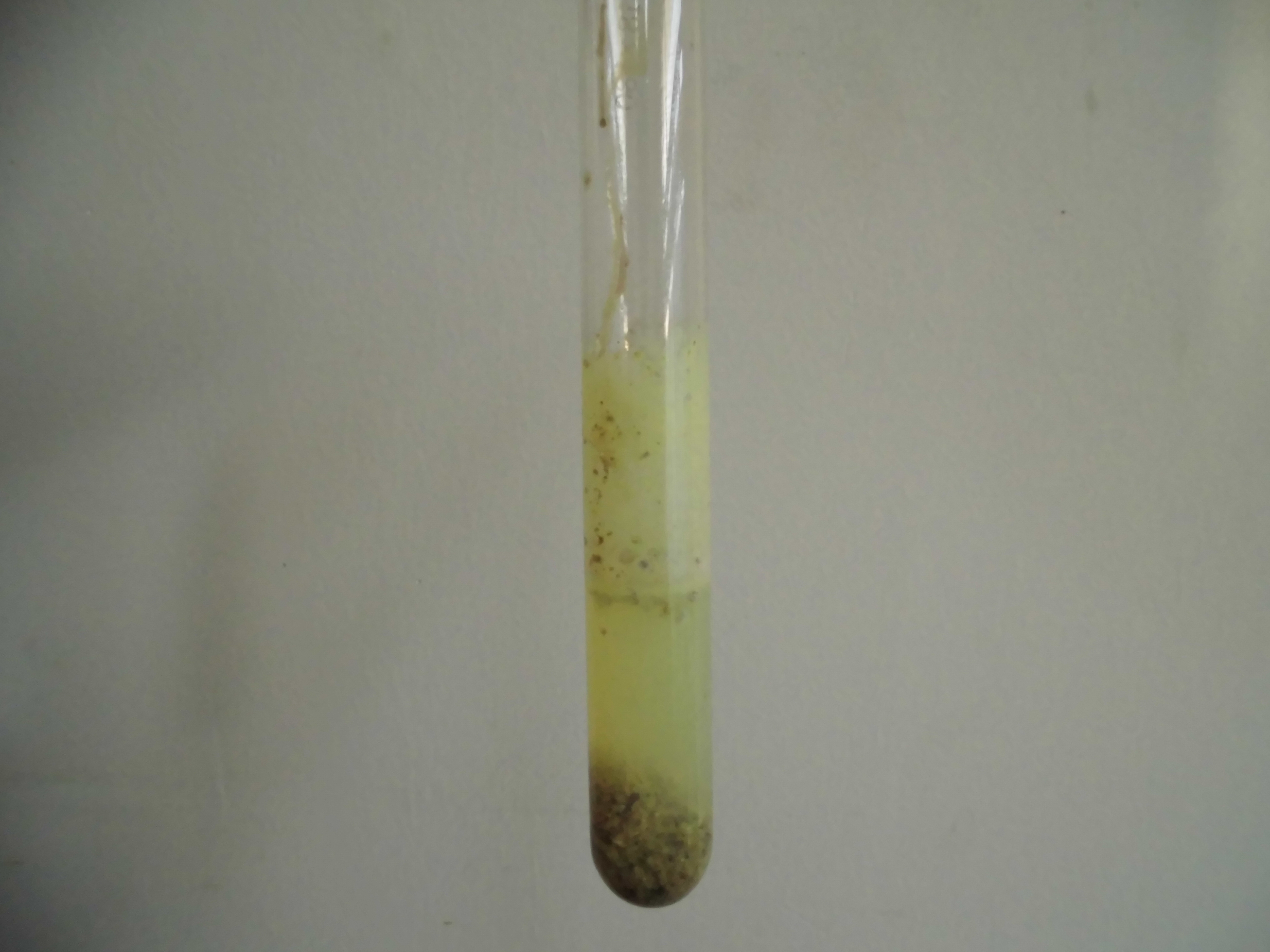 将C2H2通入银氨溶液，产生Ag2C2沉淀。C2H2由电石（CaC2）和水反应产生，夹杂有杂质，使沉淀变黄。Ag2C2可以用盐酸处理。